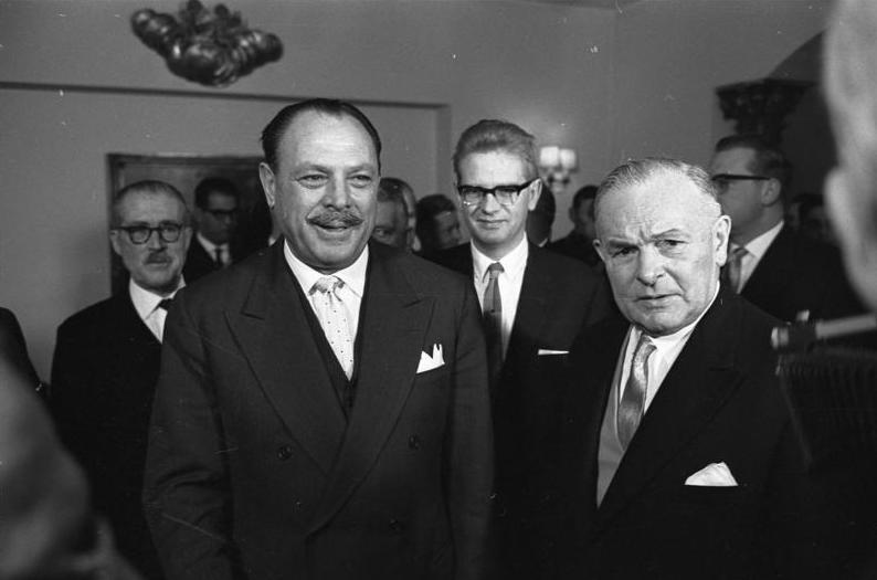 Pakistanischer Staatspräsident Ayoub Khan zu Besuch in Deutschland Essen mit dem bayerischen Ministerpräsidenten Ehard im Hotel Continental (München)